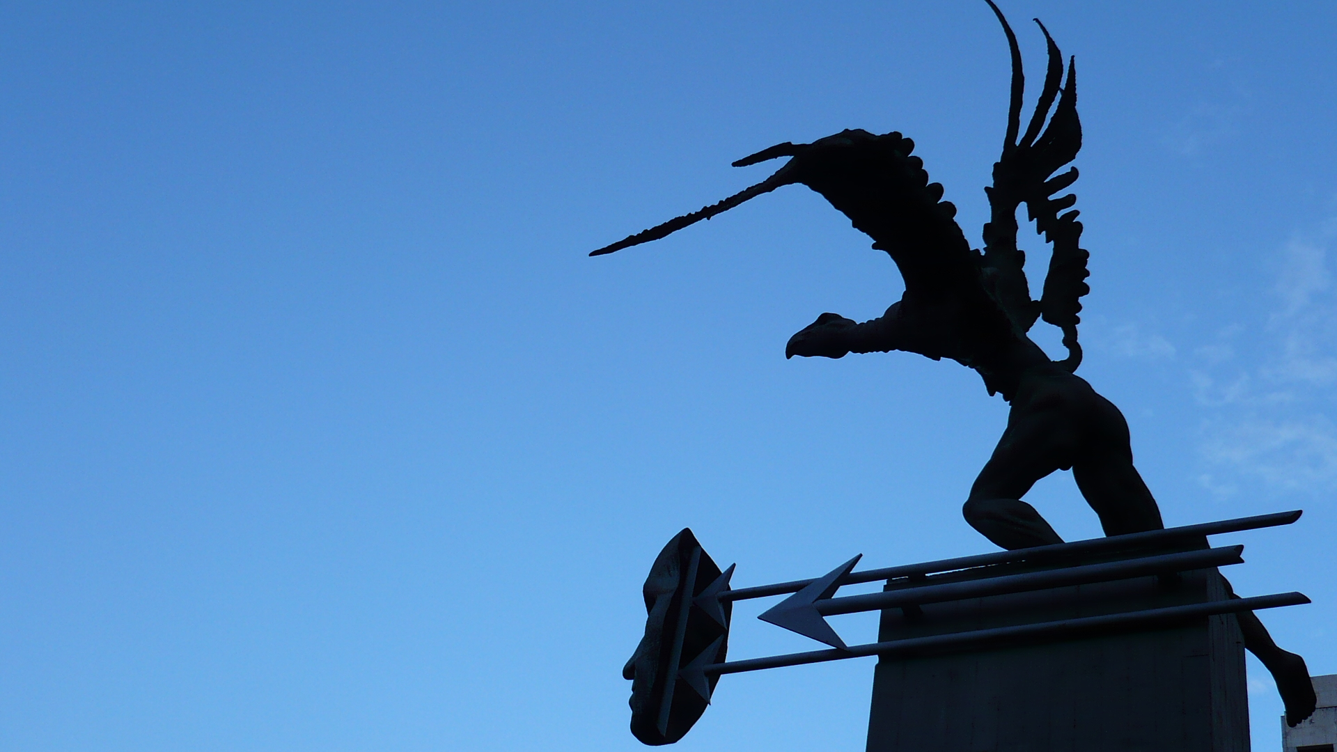 En la Plaza de Bolívar de Manizales está esta escultura del maestro Arenas Betancourt: Bolívar Cóndor. "En la interrogación de su altura y de su vuelo, podrán encontrar las almas superiores una explicación de los sentimientos de eternidad y de los anhelos de inmortalidad que agitan las veleidades del ser humano, sediento de grandeza y poder."